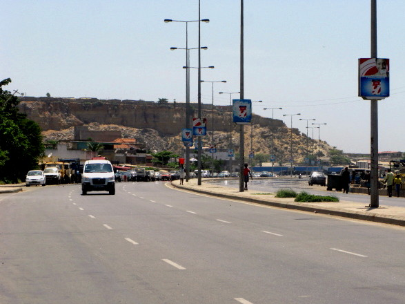 Morro da Samba, Luanda, Angola